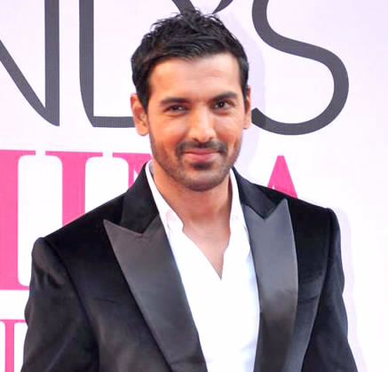 John Abraham at Femina Miss India finale 2013 at Yashraj Studio